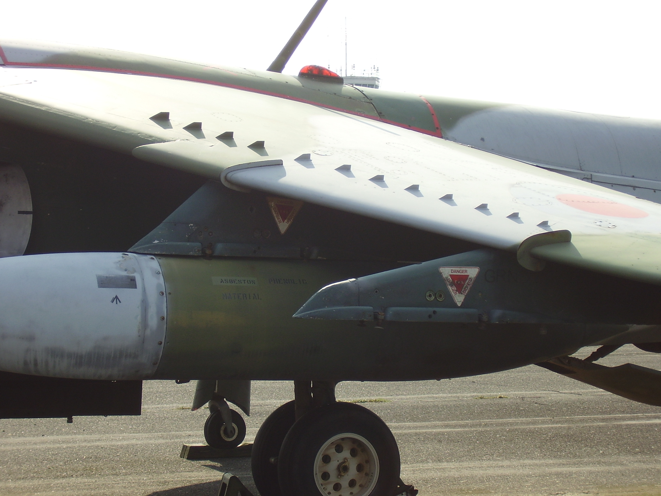 Vortexgenerator beim BAE Harrier ; Luftwaffenmuseum der Bundeswehr; Airforce Museum of the Bundeswehr; Berlin-Gatow